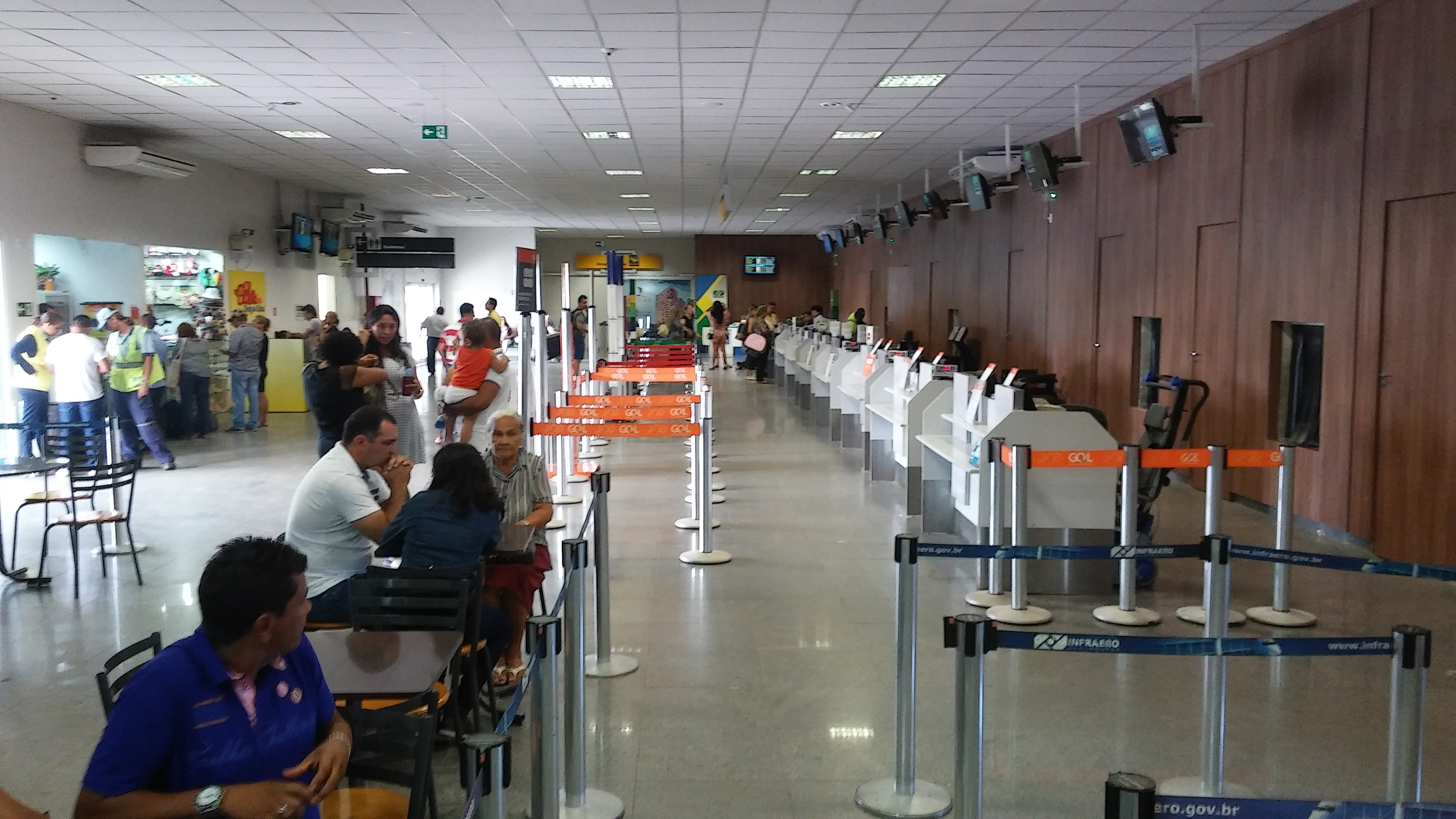 Aeroporto Internacional de Santarém.